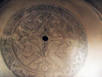 კაცხის ტაძარი